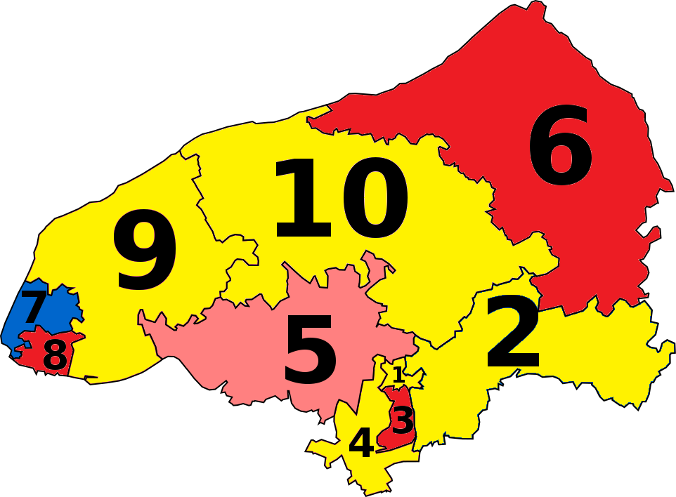 Députés de Seine-Maritime élus en 2017